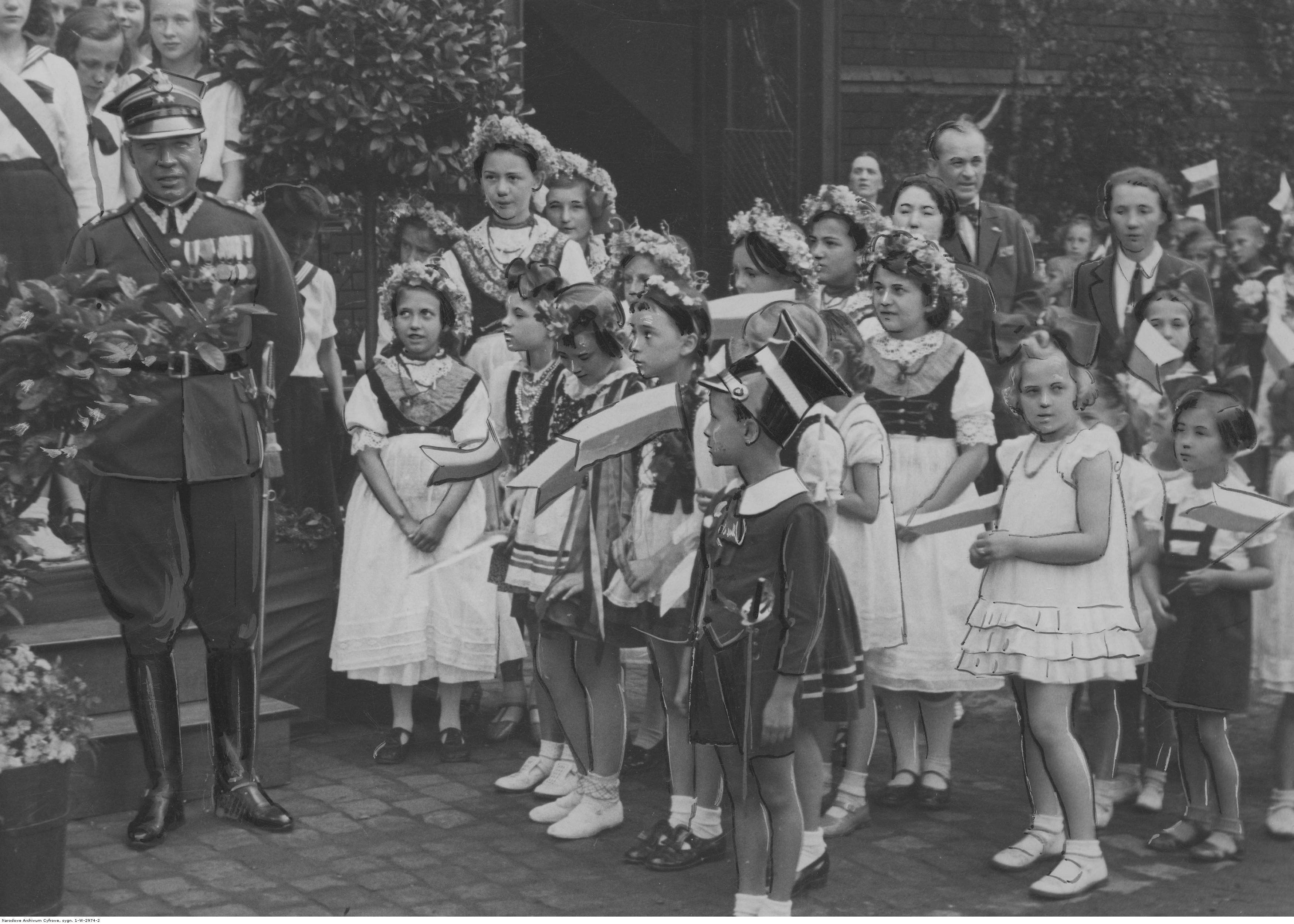 Przekazanie 73 Pułkowi Piechoty sprzętu bojowego, ufundowanego przez dzieci ze szkoły im. Szafranka w Katowicach. Dzieci ze szkoły im. Szafranka w Katowicach na fotografii grupowej z dowódcą 73 Pułku Piechoty ppłk. Piotrem Sosialukiem; sierpień 1939. Koncern Ilustrowany Kurier Codzienny - Archiwum Ilustracji. Sygnatura: 1-W-2974-2